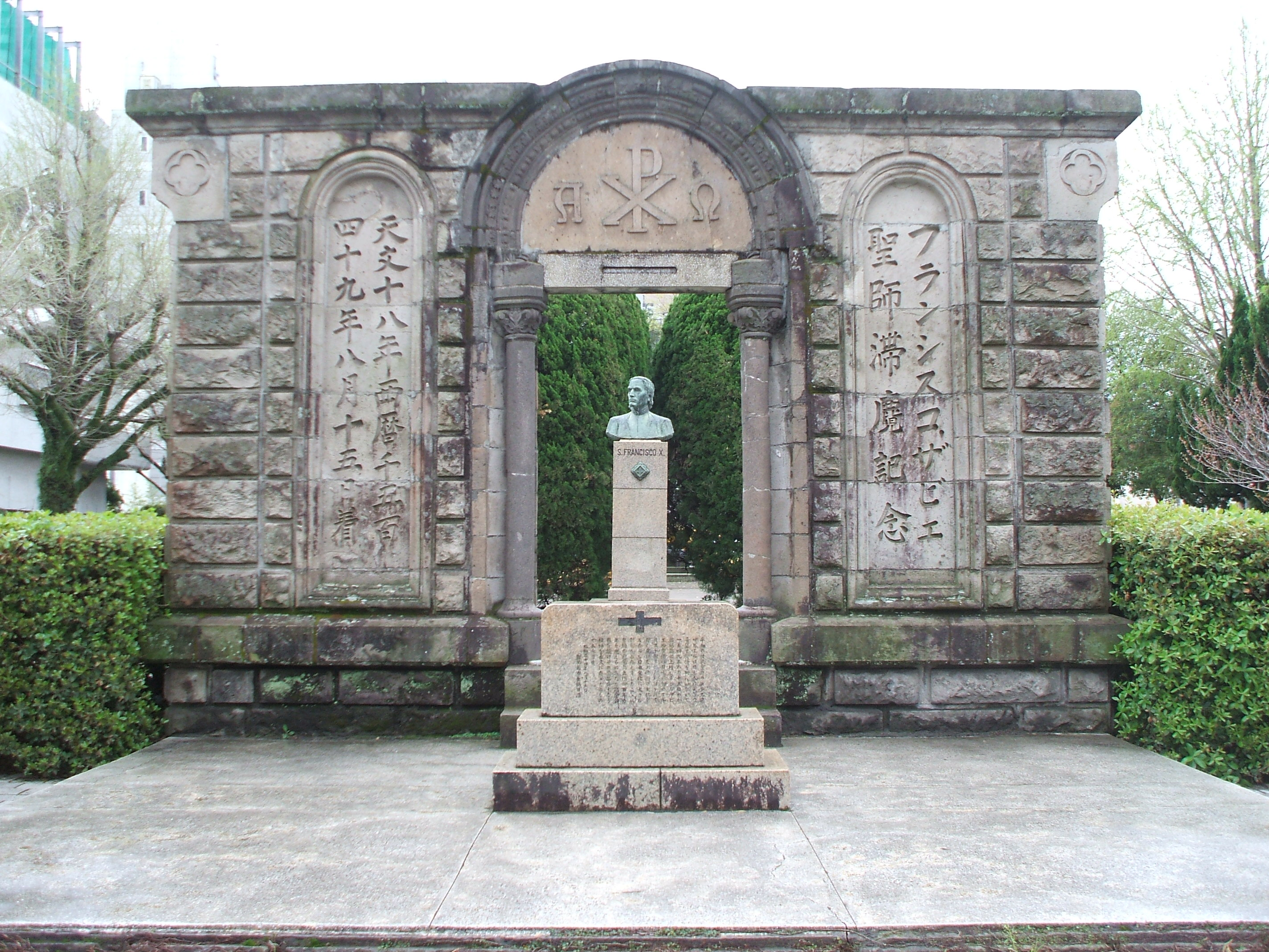 鹿児島県鹿児島市のザビエル公園にあるザビエル来鹿記念碑